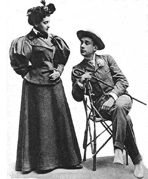 Los actores María Guerrero y Fernando Díaz de Mendoza